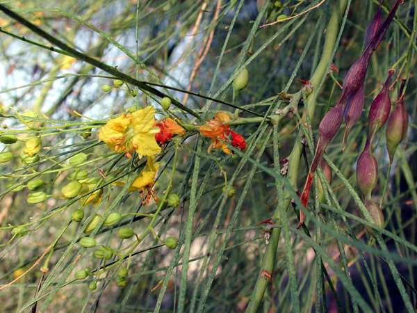 Parkinsonia aculeata, Jerusulem Thorn. Maricopa Co., Arizona, USA